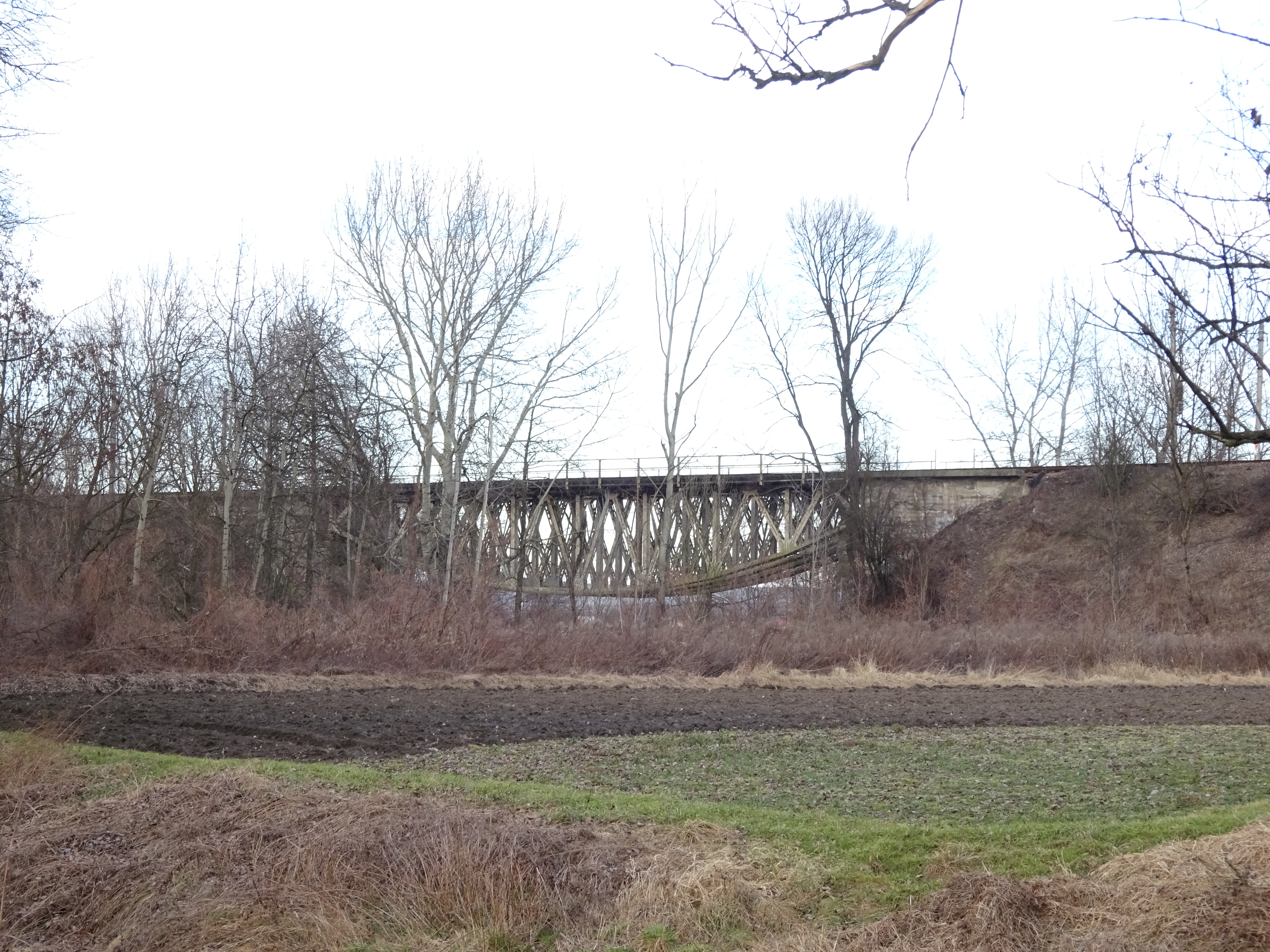 Ciekawy most kolejowy na linii nr 95 nad rzeką Dłubnią i ul. Zesławicką w Krakowie-Zesławicach.